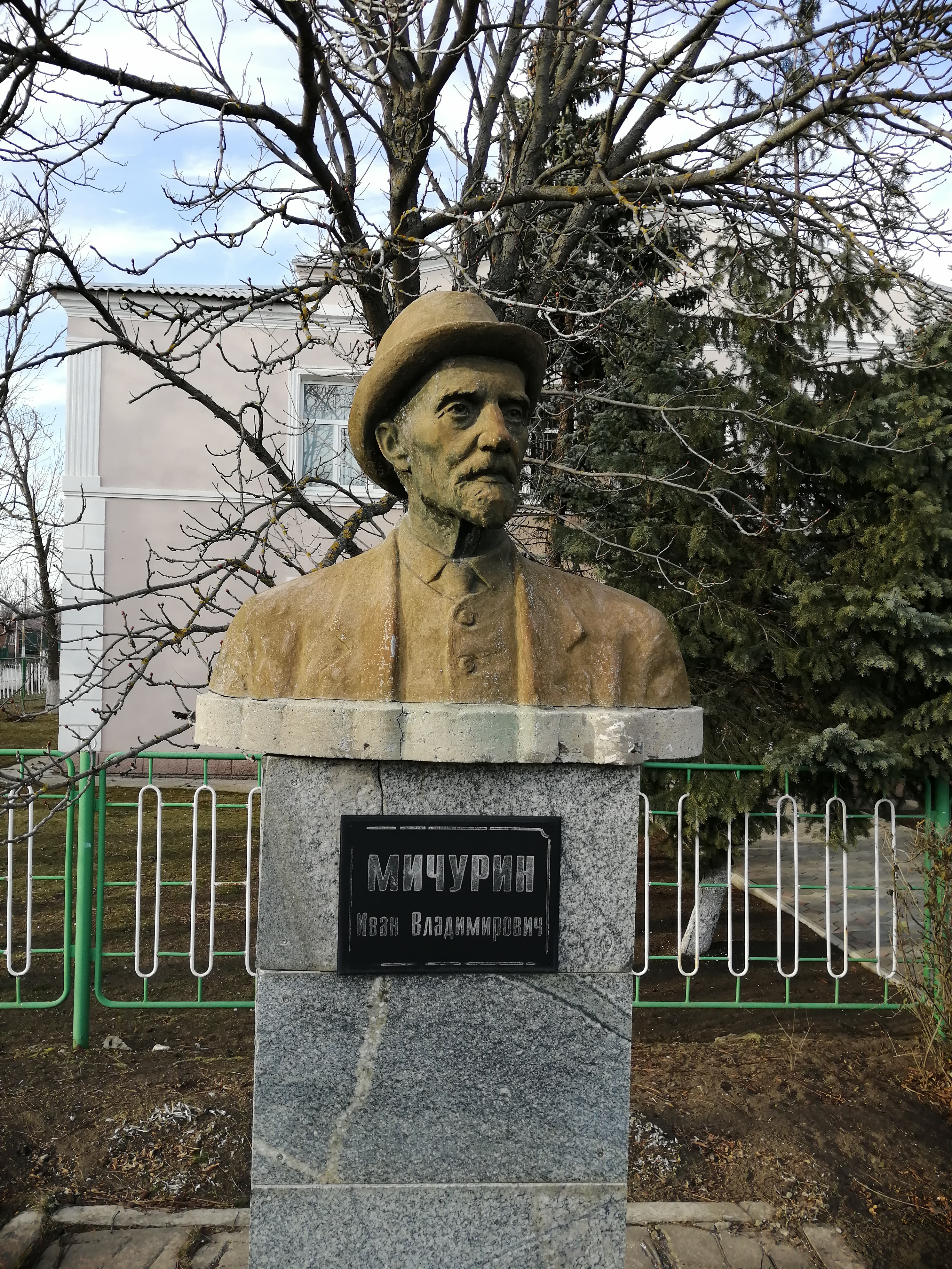 Памятник Мичурину в селе Федоровка, Ростовская область